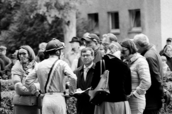 Galoppsport